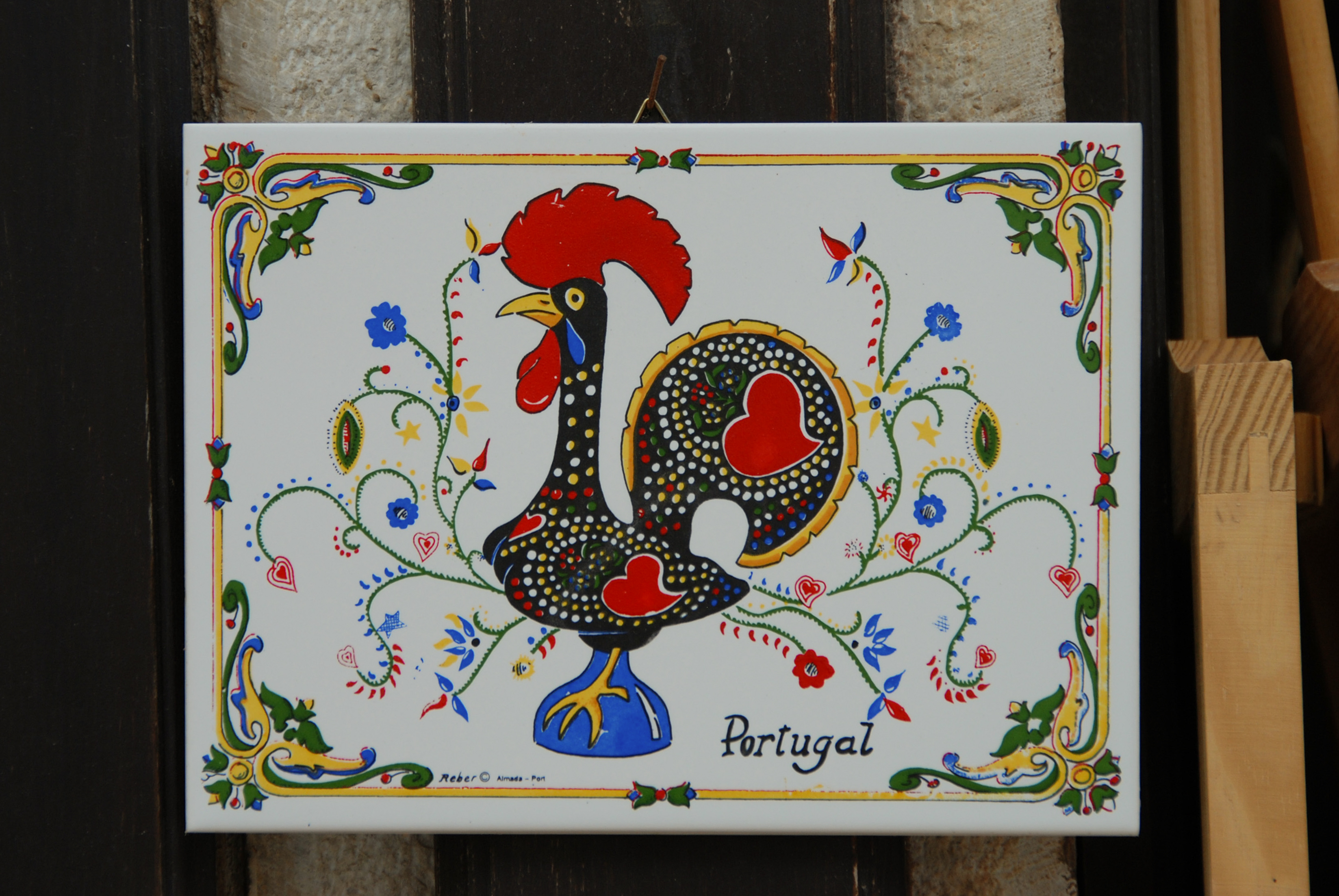 Azulejo representativo do Galo de Barcelos - Algarve.